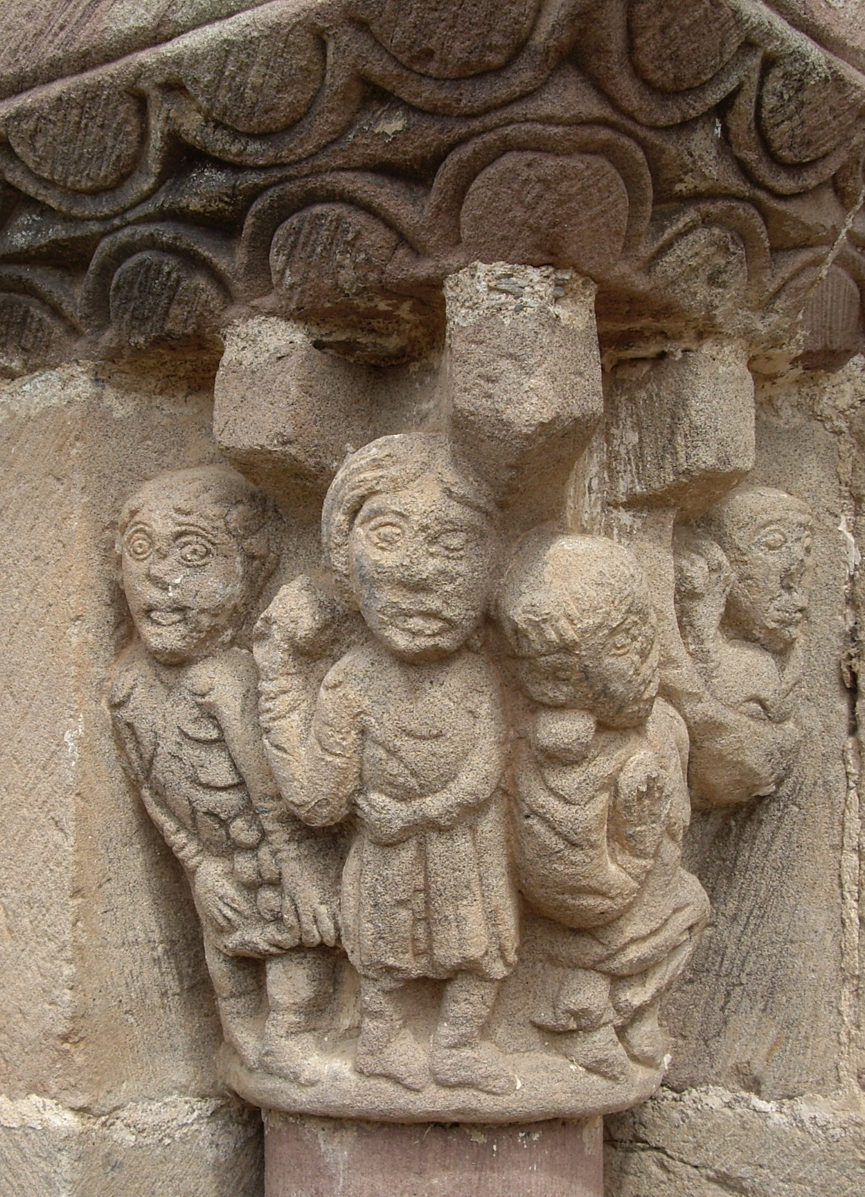 Detalle de la iglesia de San Esteban en Zorraquín, La Rioja, España.